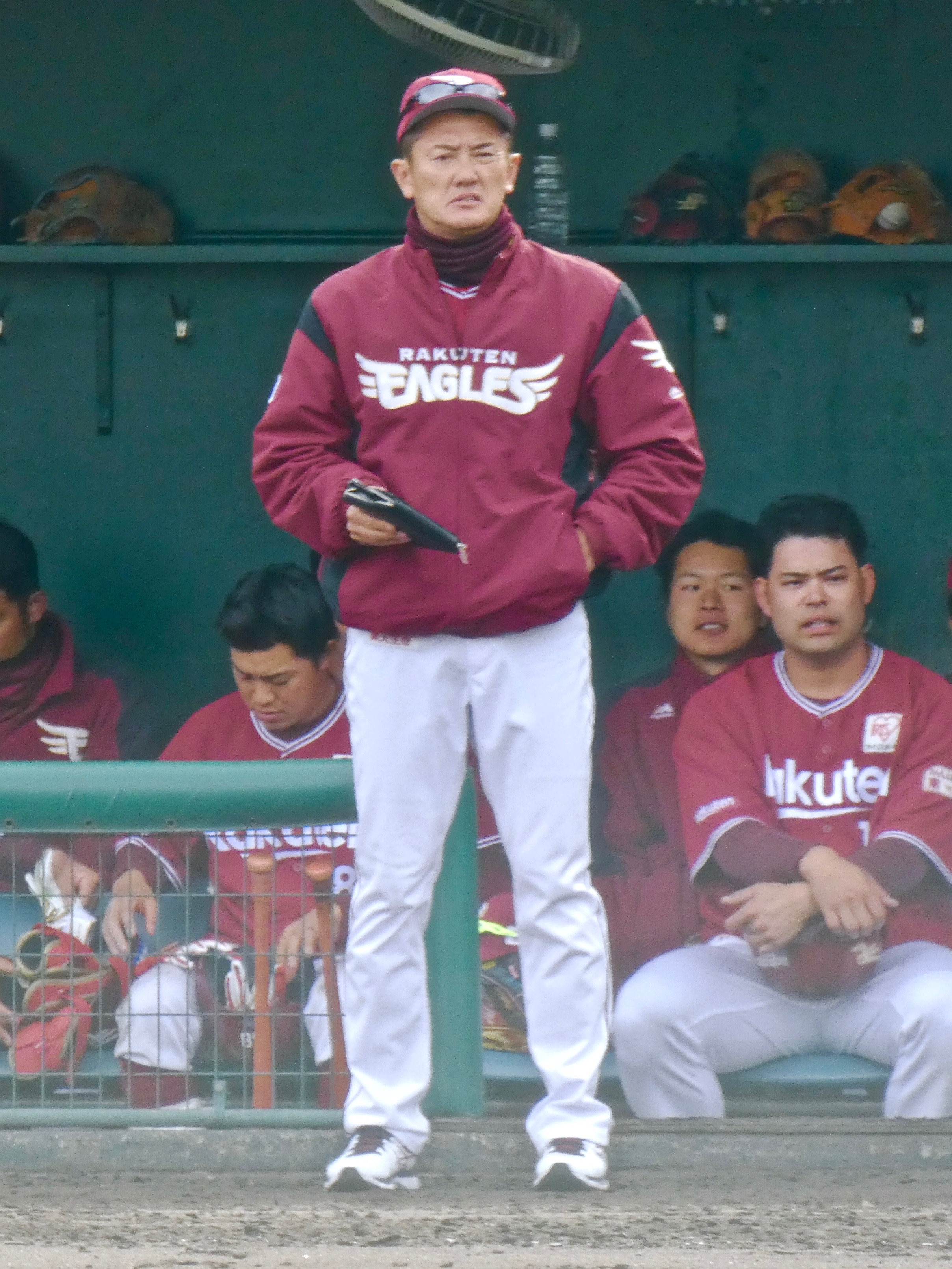 東北楽天ゴールデンイーグルスのコーチ「石井貴」。ロッテ浦和球場にて。